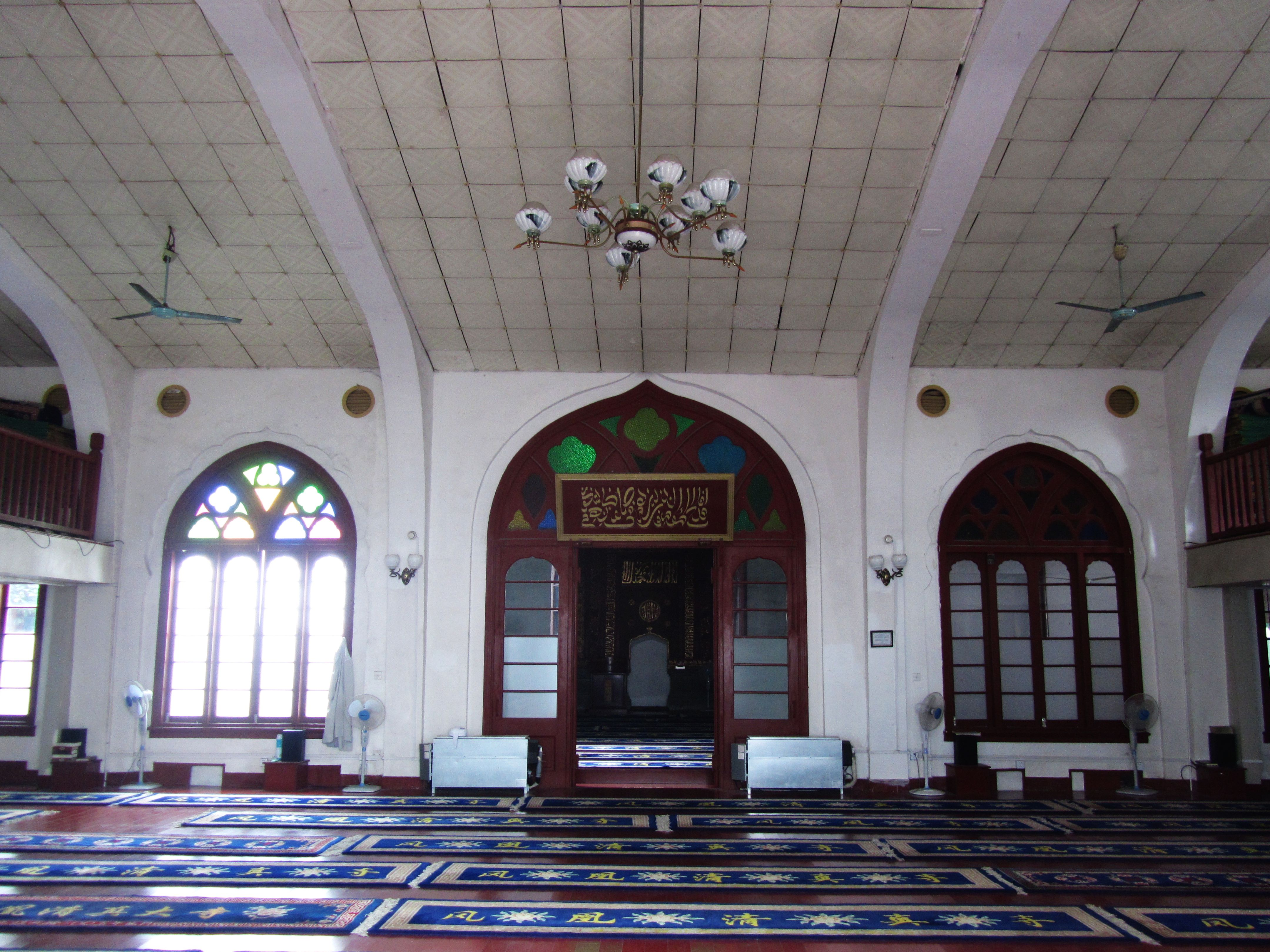 杭州凤凰寺，大殿内景。